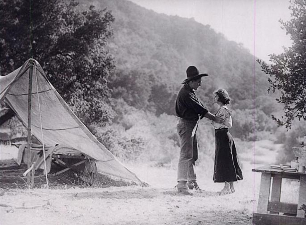 Imagen de la película de John Ford Hell Bent en la que Cheyenne Harry (Harry Carey) habla con Lola (Neva Gerber).